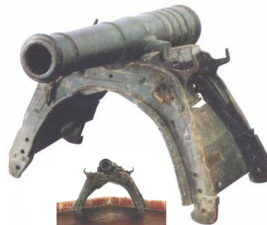 Cañon de montaña, 1809, Casa de la Libertad, Sucre